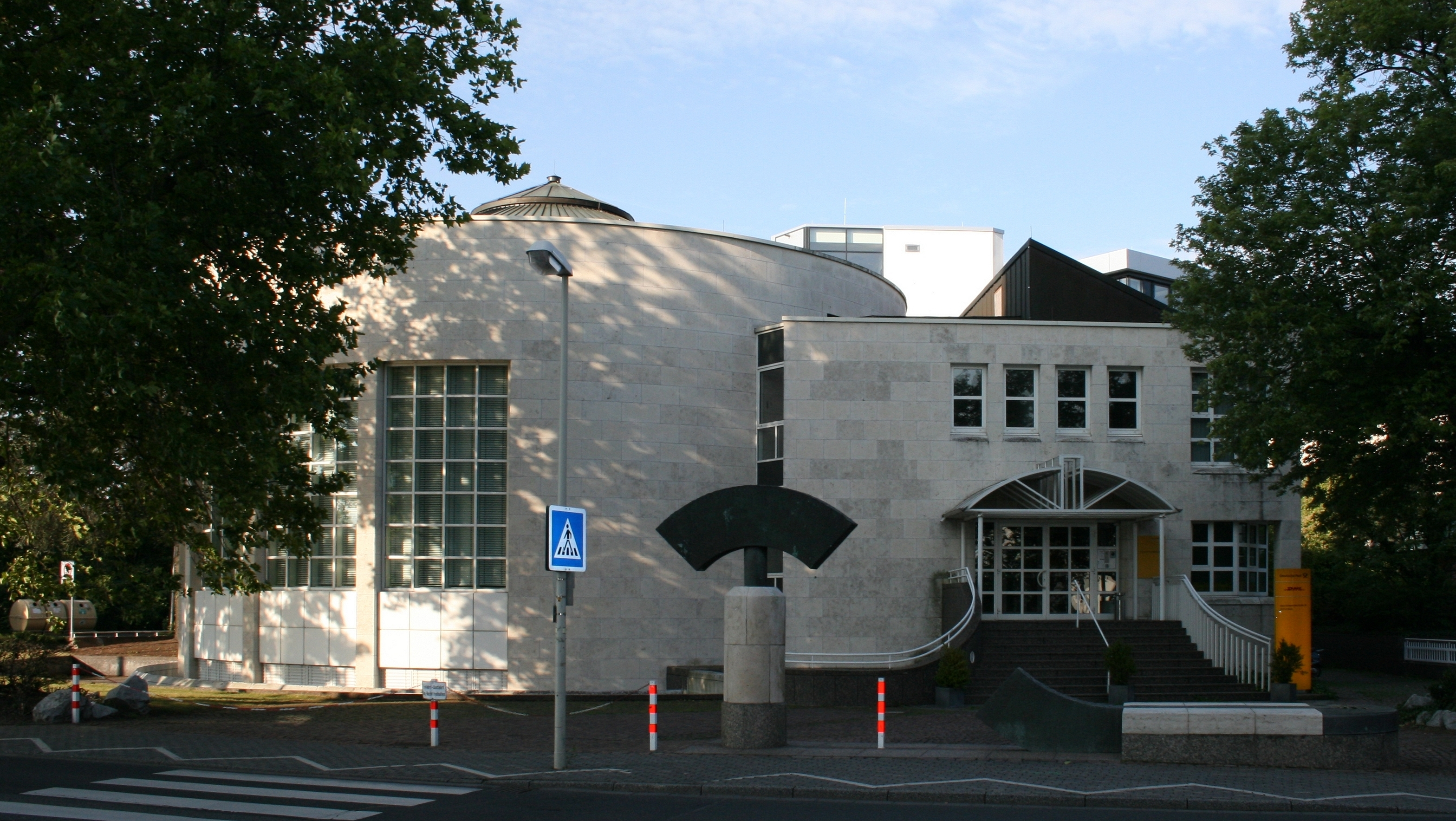 ehemalige Landesvertretung Niedersachsens beim Bund in Bonn, Ortsteil Gronau, Kurt-Schumacher-Straße 28; nun durch die POST AG genutzt.